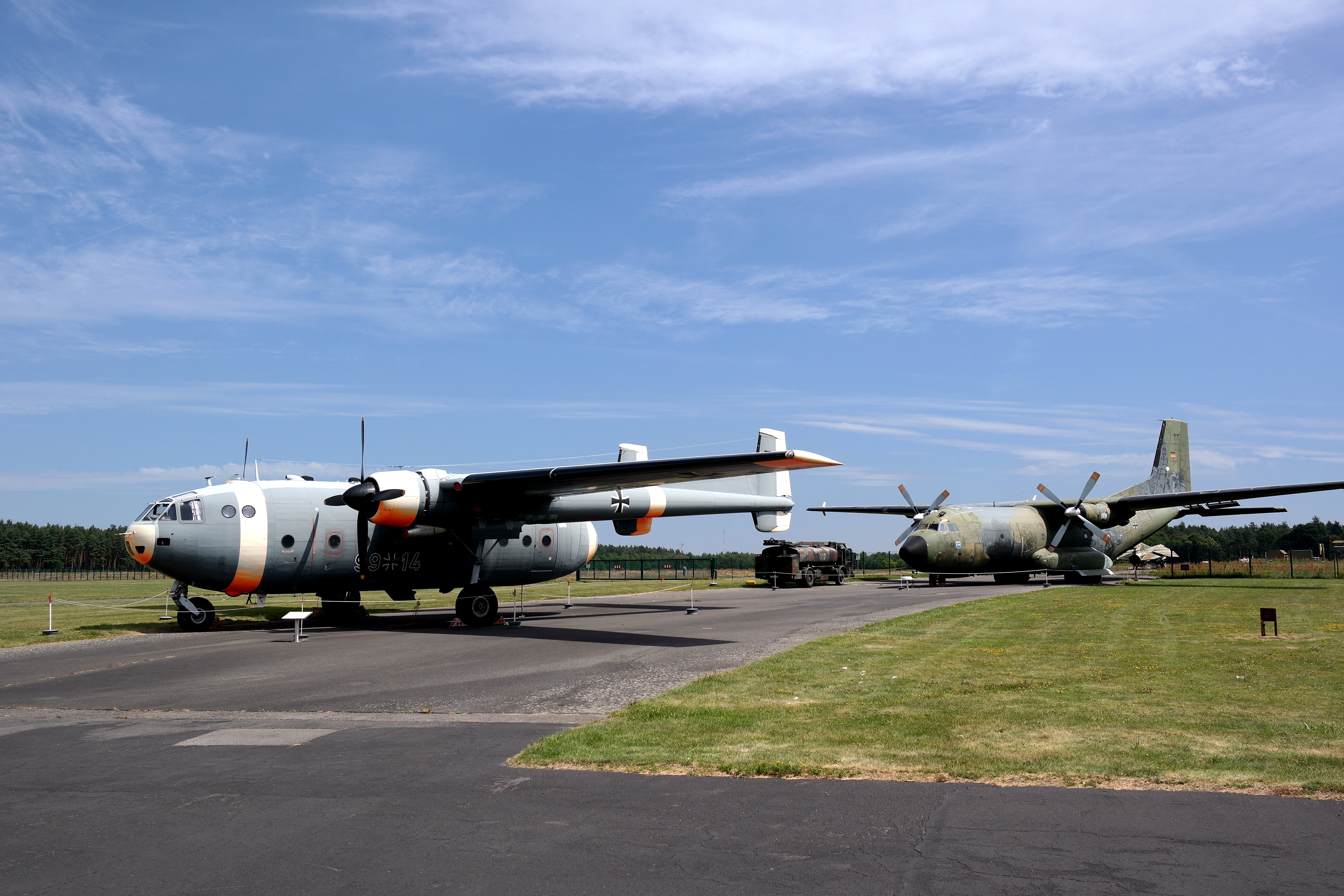 Militaerhistorisches Museum der Bundeswehr Flugplatz Berlin-Gatow